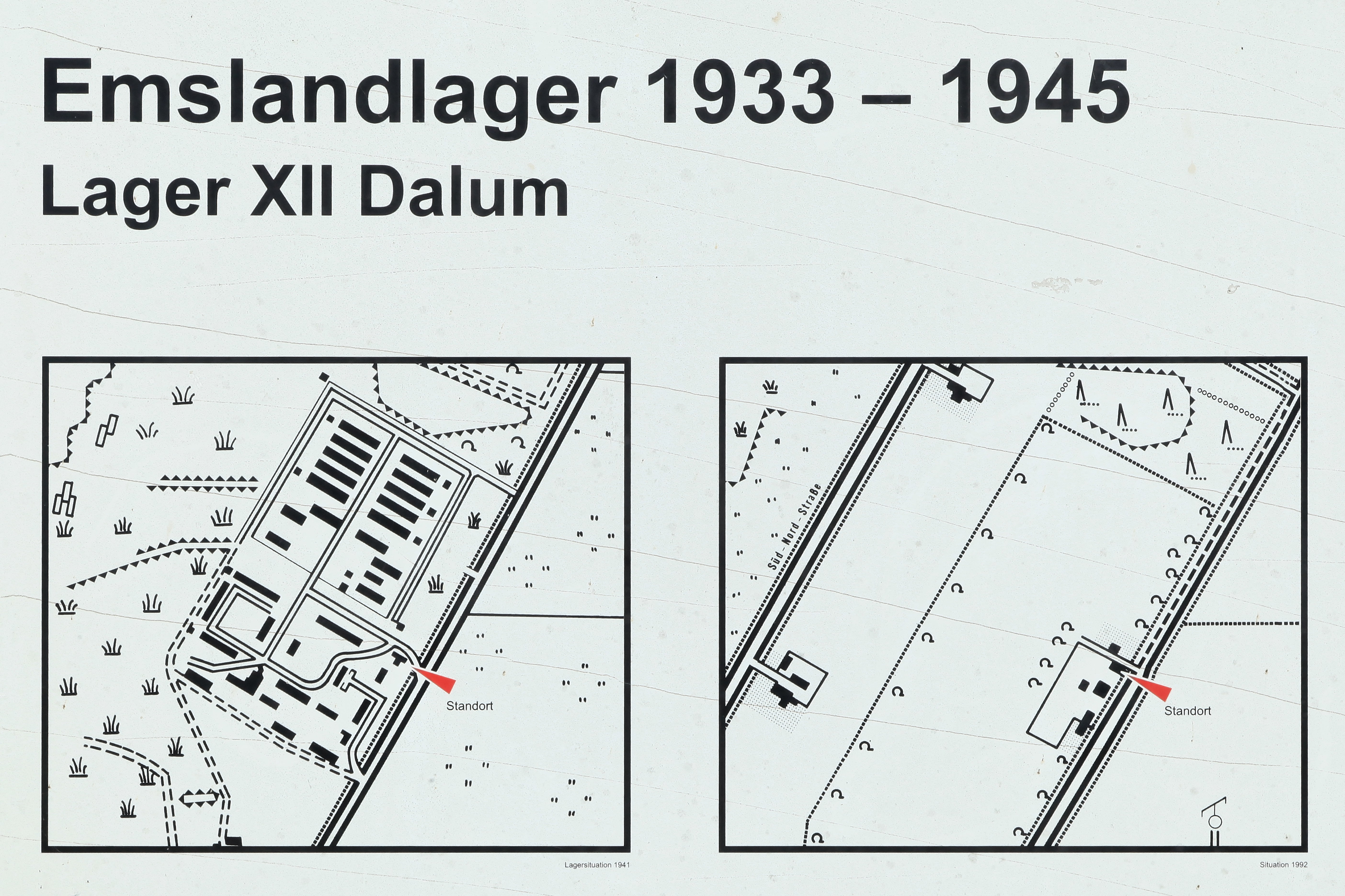 Ehemaliges Emslandlager Dalum, Am Wasserwerk in Geeste